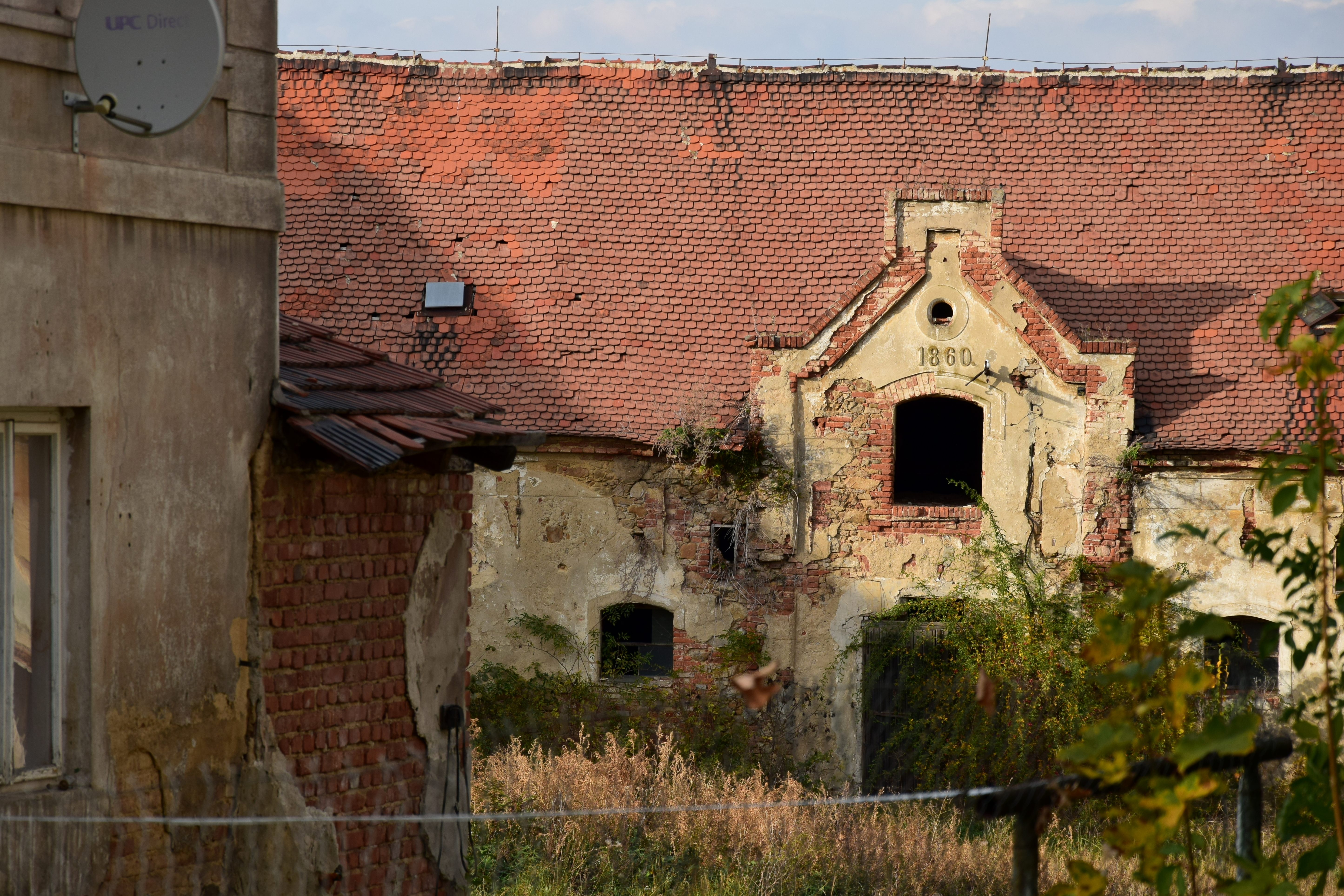 Zámek Poláky – průčelí hospodářské budovy ve dvoře